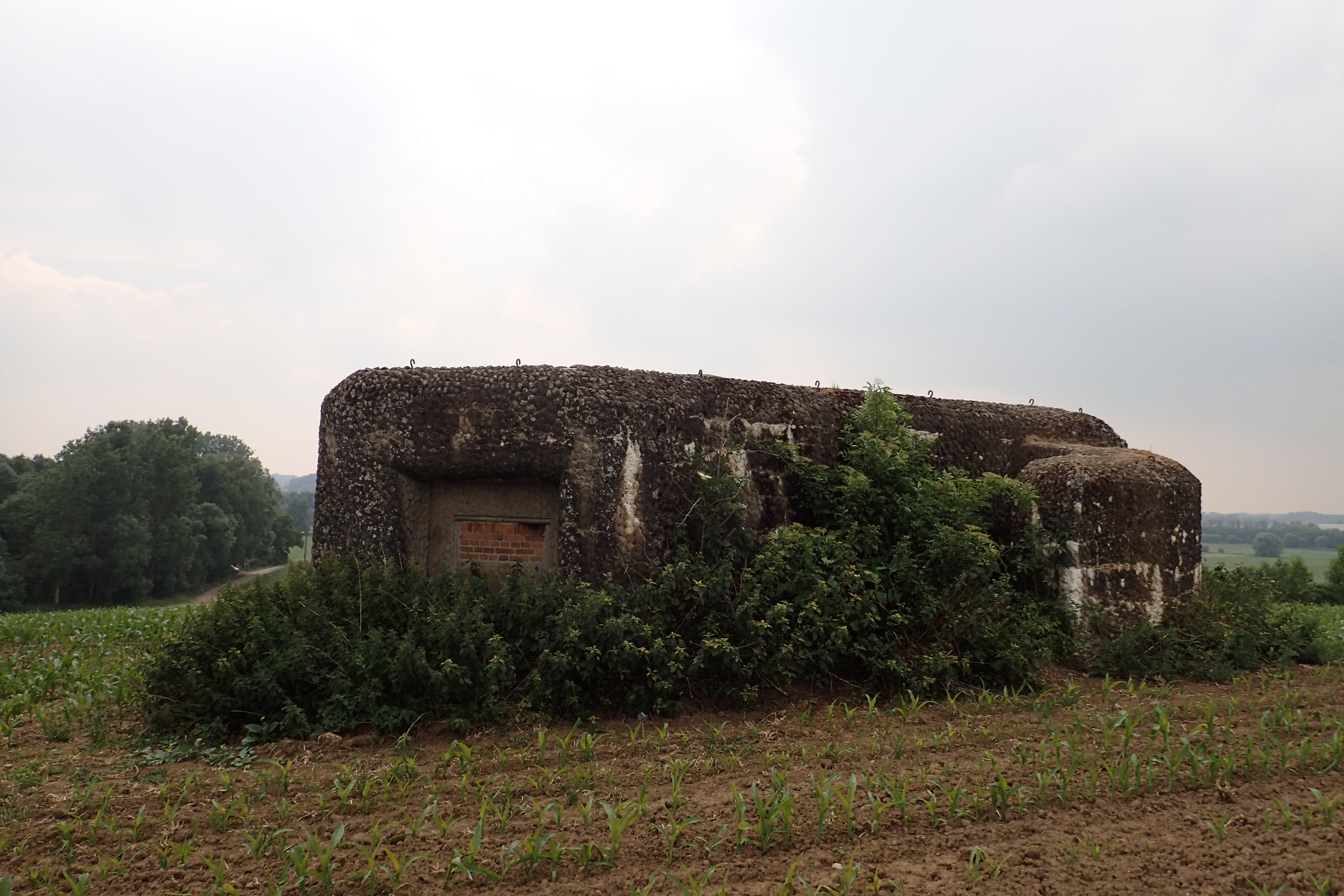 Bunker Ni6 - Begaardenstraat